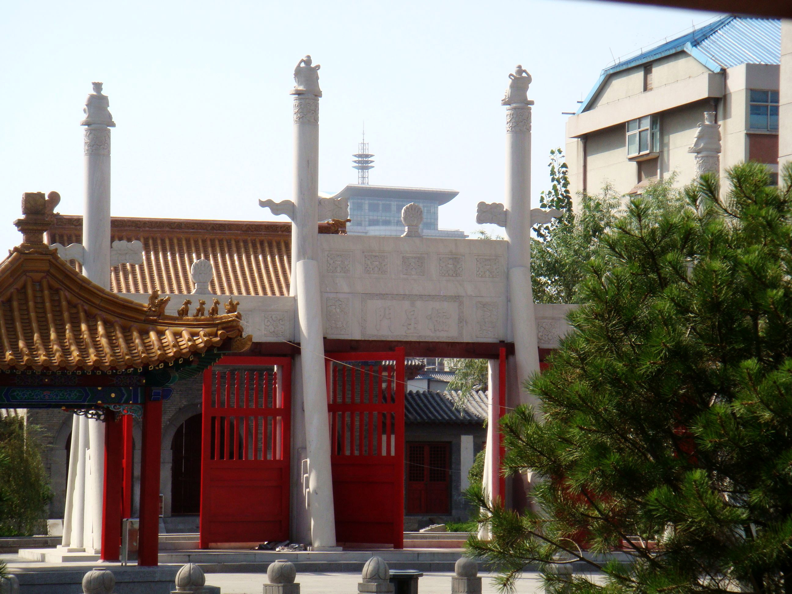 济南府学文庙，图中所示为自北向南看棱星门。